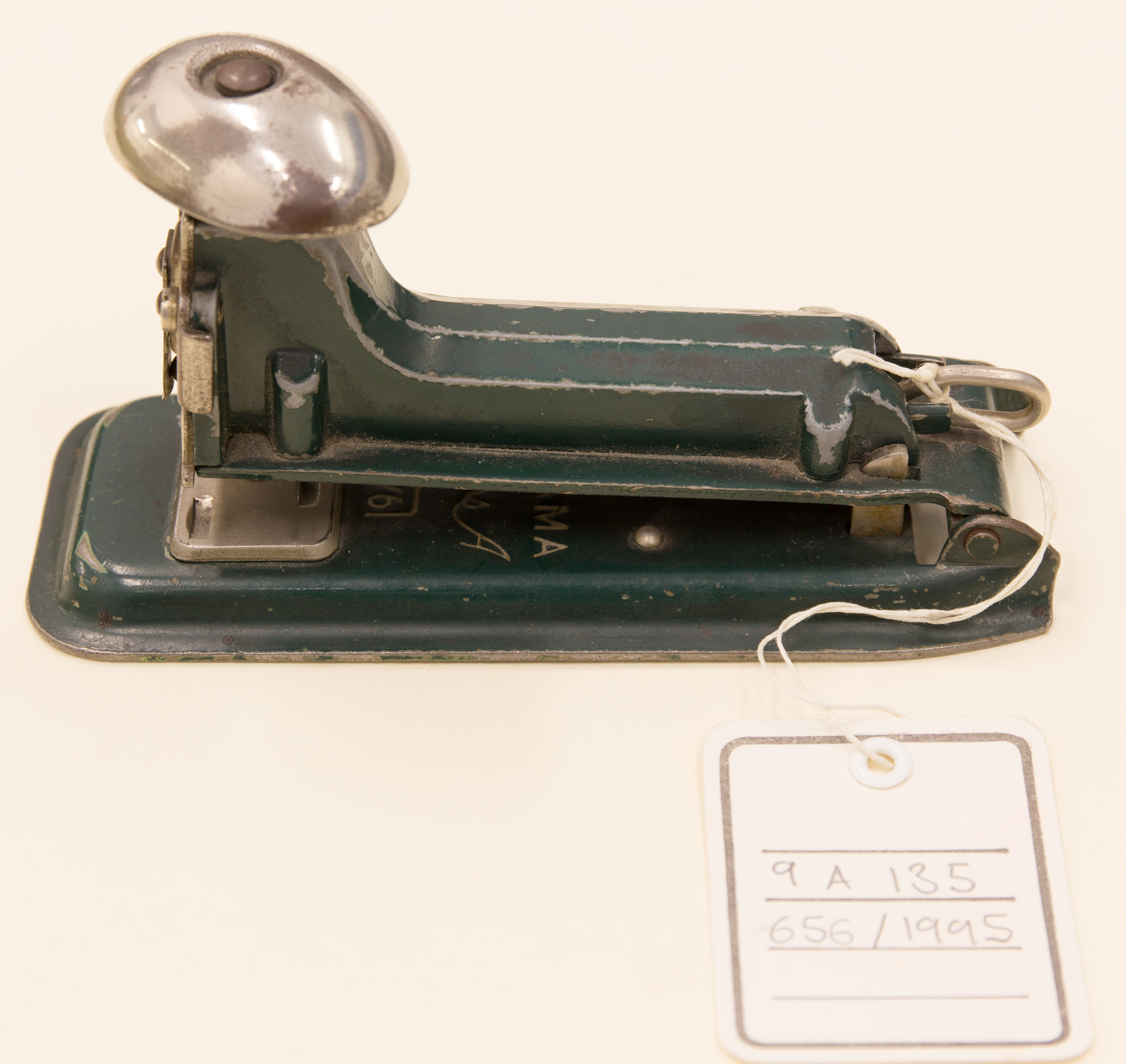 Heftklammergerät; Tacker BUKAMA Knirps A 24/6 Indetifikations-Nr.: N (9 A 135) 656/1995 Datierung: um 1930 Herstellungsort: Deutschland Höhe x Breite: 7 x 12,5 cm Ausgabe: Metall, geschraubt Beschreibung: Der grün gefasste Heftklammerer wird durch Aufschrauben an der Kopfseite gefüllt. Auf der Bodenplatte ist der Firmenname eingraviert: BUKAMA Knirps und die Nummern 24/6. Die Klammern werden durch Drücken eidesunbemalten, beweglichen Knopfes in das Papier gedrückt.